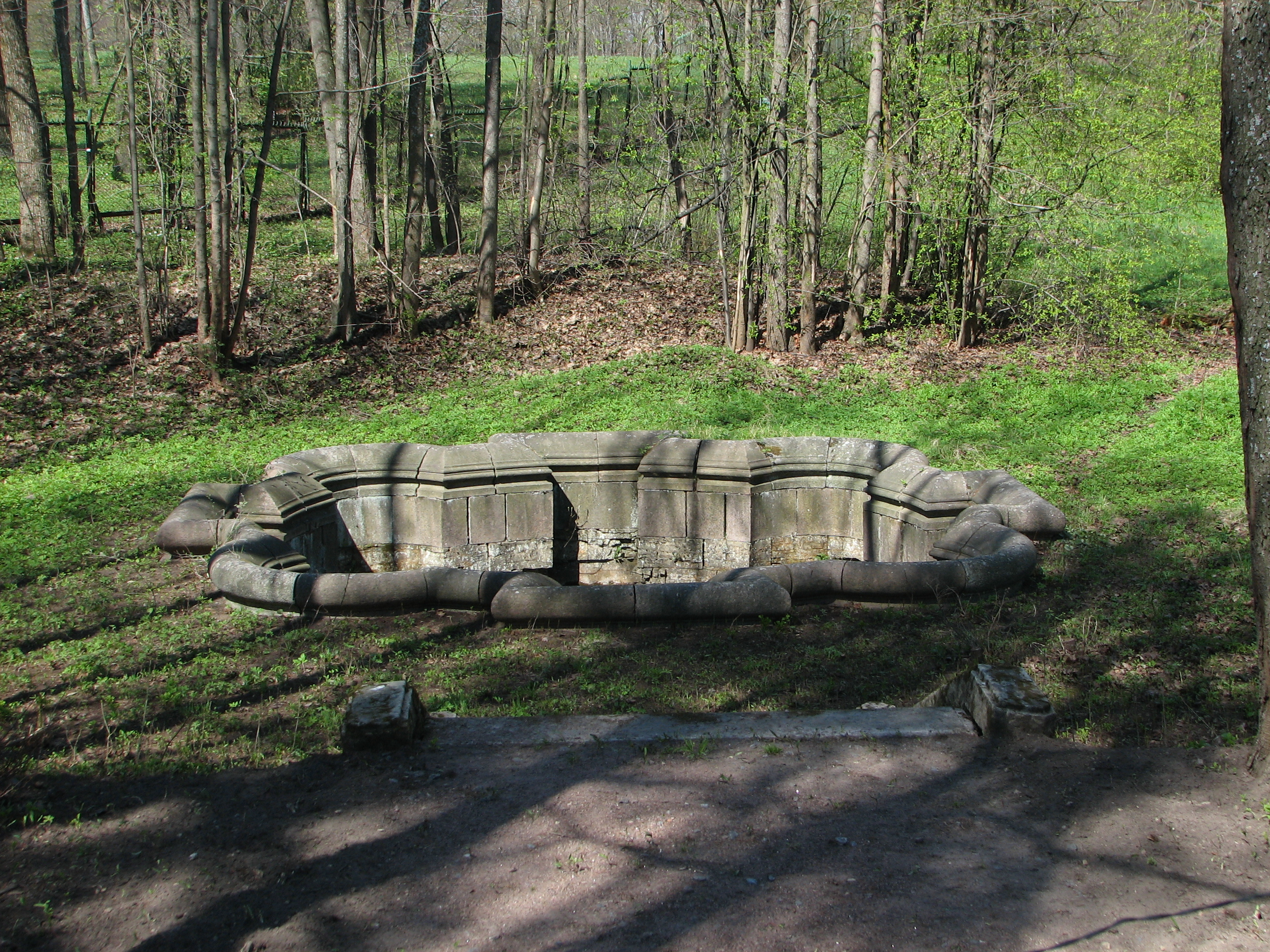 Восьмигранный колодец в Дворцовом парке (Гатчина, Россия)